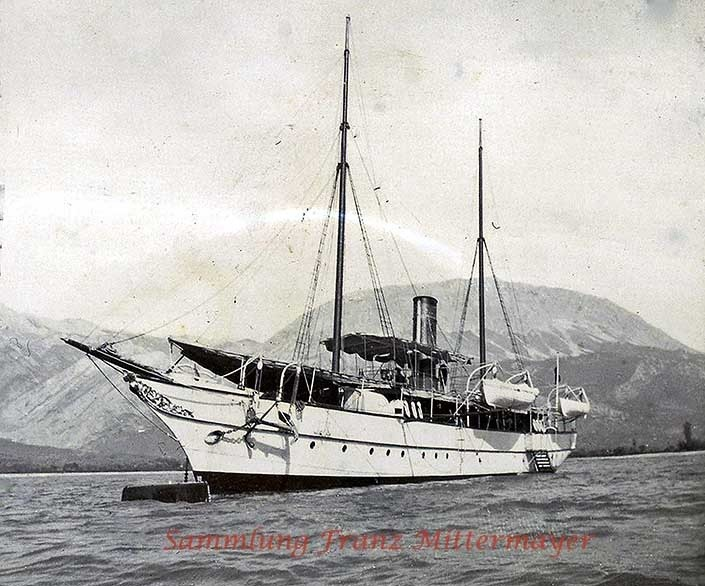 Montenegrinische Königsyacht Rumija